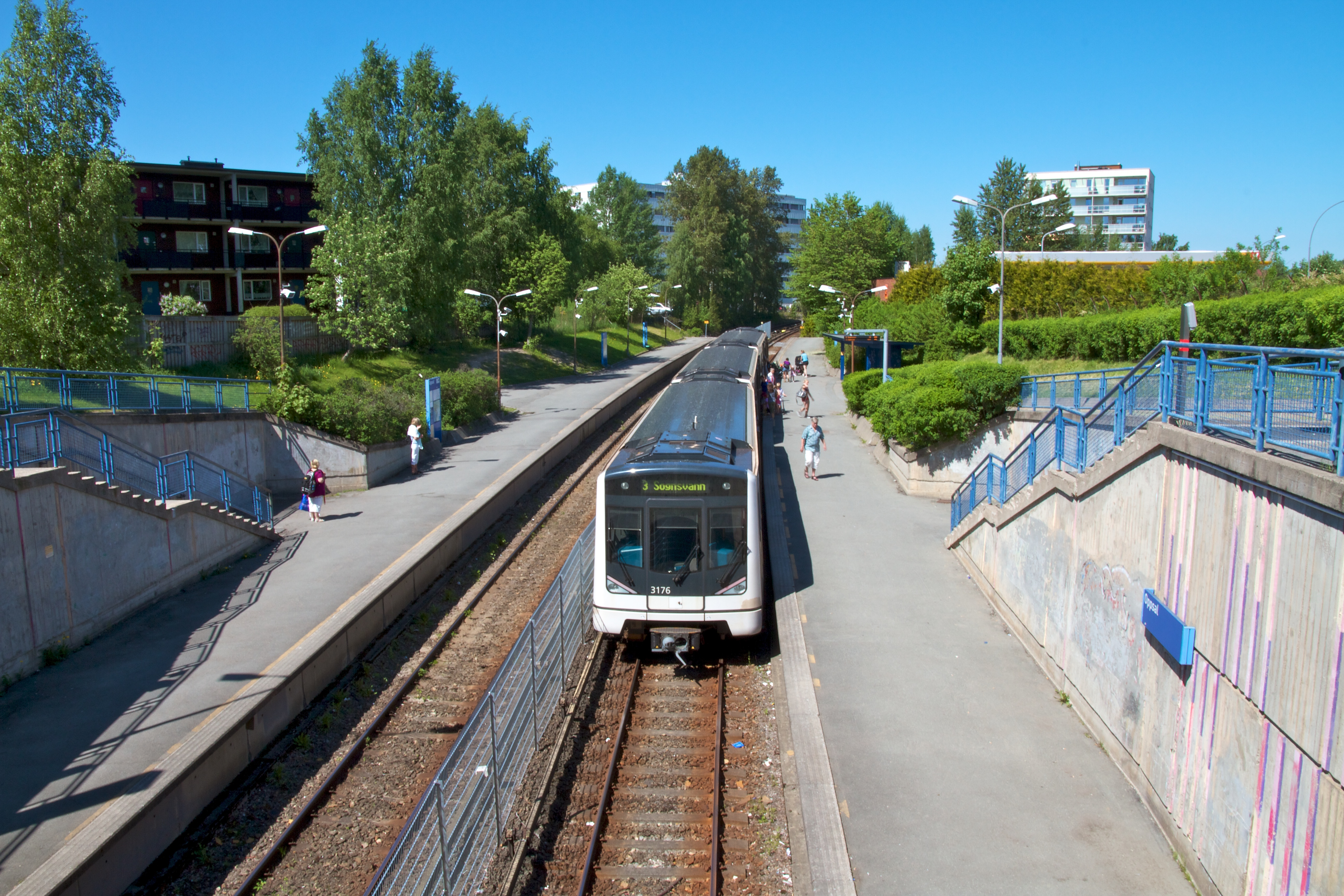 Oppsal stasjon i Oslo.